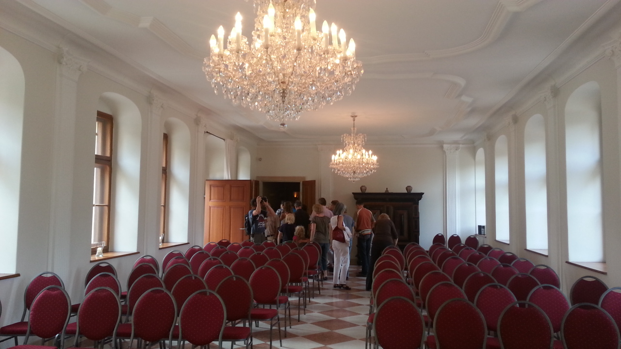 Festsaal in Schloss Proschwitz (ehemalige Schlosskapelle) an der Decke Leuchter aus Böhmischem Glas